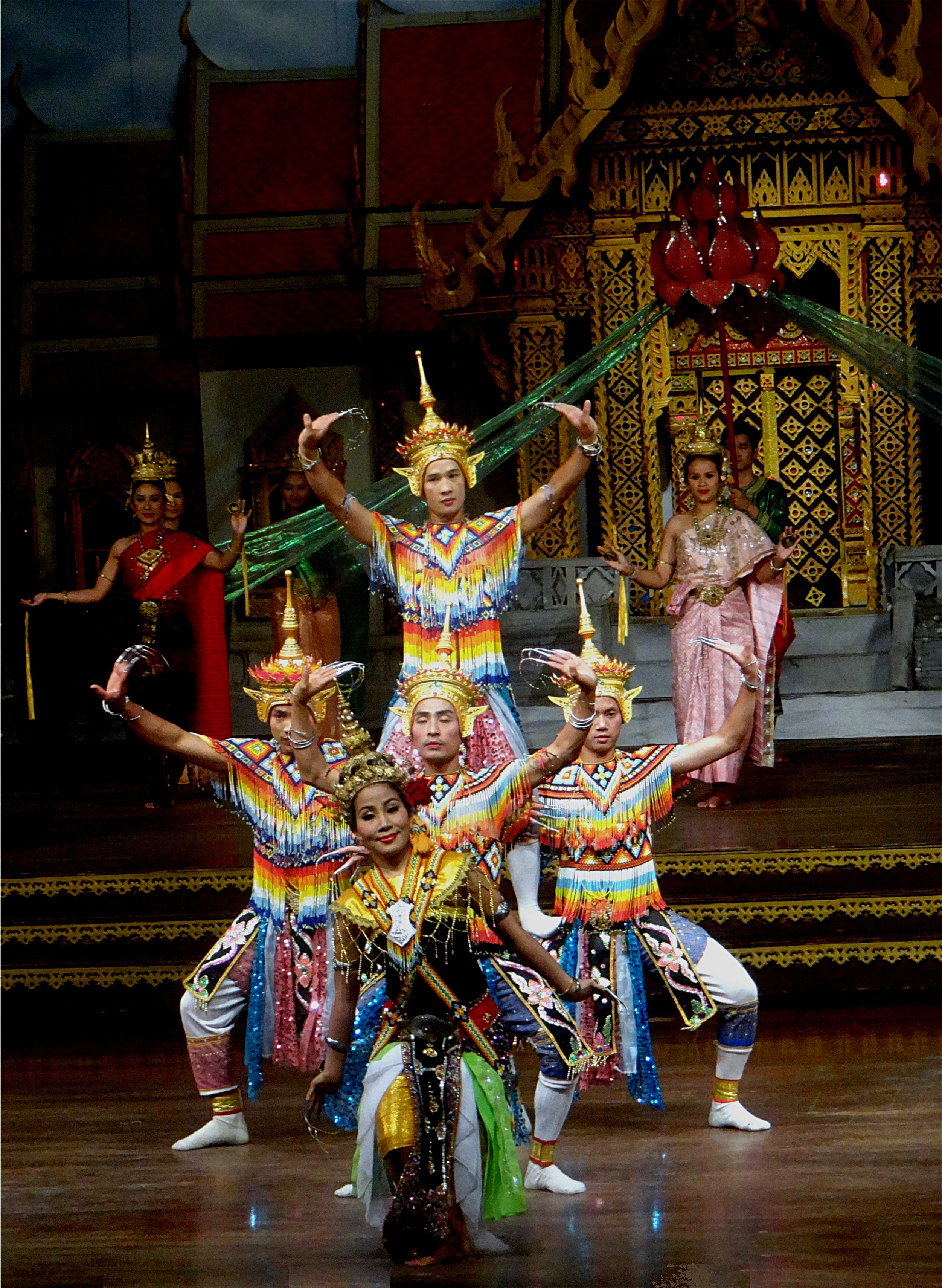 Jardin botanique tropical de Nong Nooch, Thaïlande. Spectacle Thai culturel traditionnel.